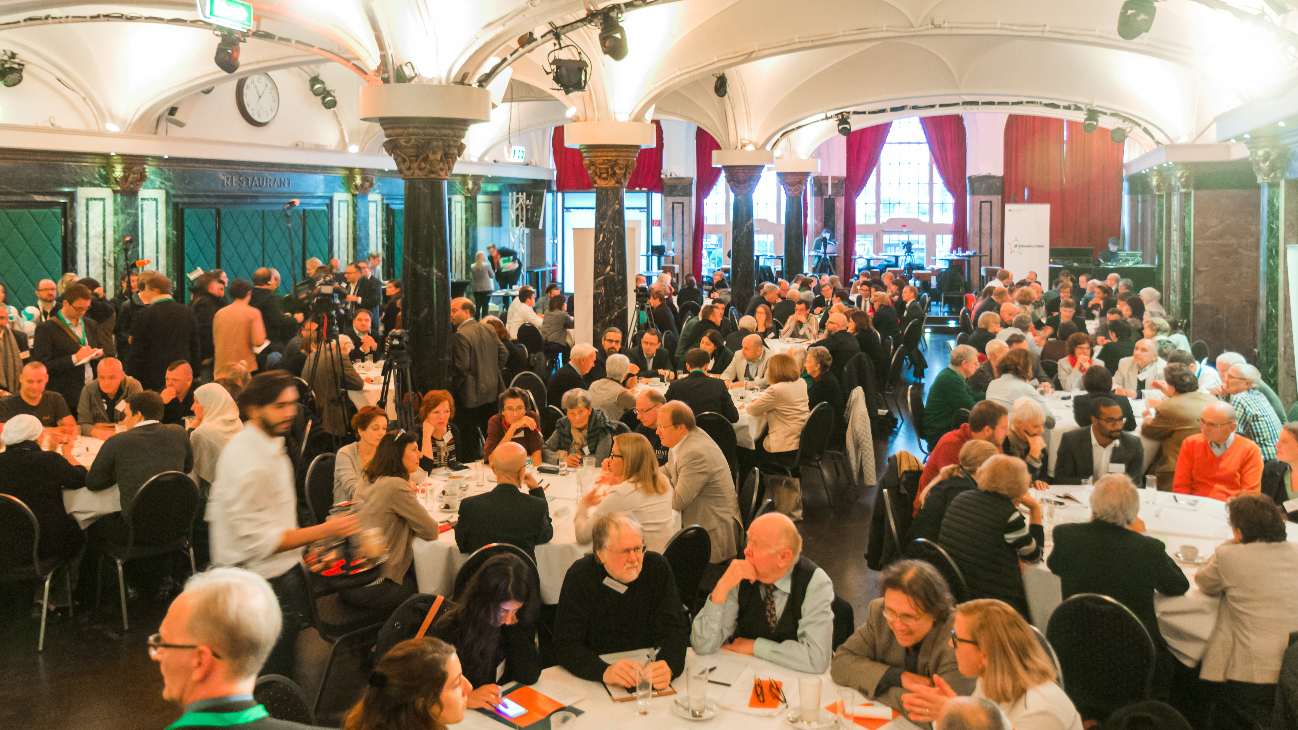 Werkstattreihe #gemeinsam für ein starkes Deutschland. Wie gelingt Integration? Wie hält eine Gesellschaft zusammen? Veranstalter: Bundesministerium des Innern. Veranstaltungsort: Alter Wartesaal Köln Foto: Workshopphase im World-Café-Stil